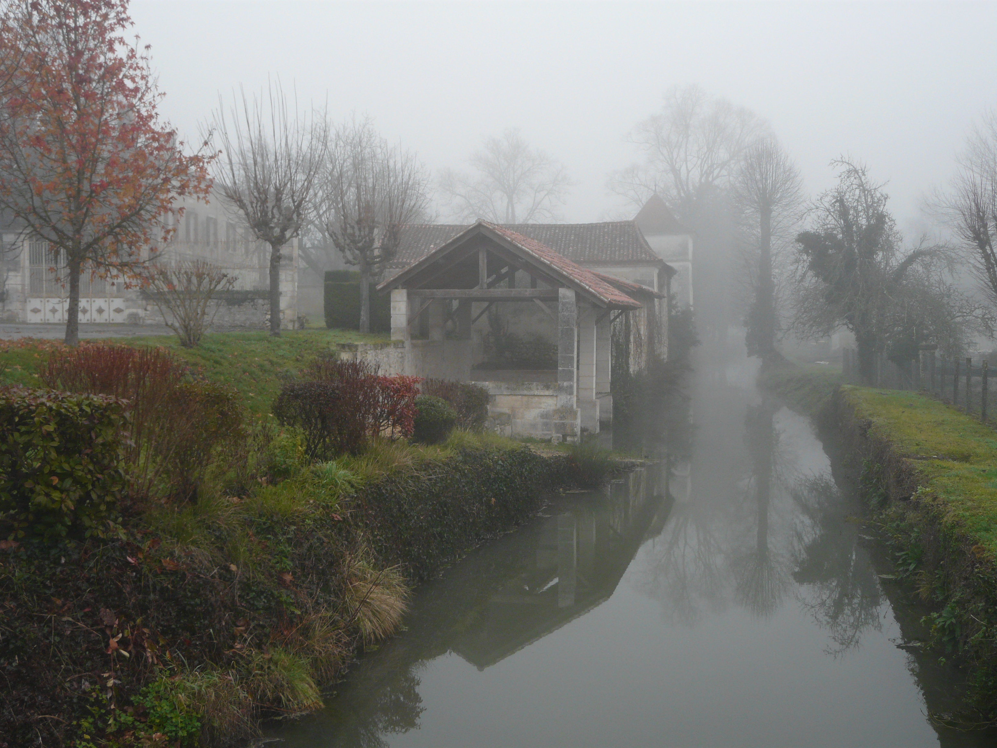 Le Tournevalude dans le village de Celles, Dordogne, France. Vue prise en direction de l'amont.